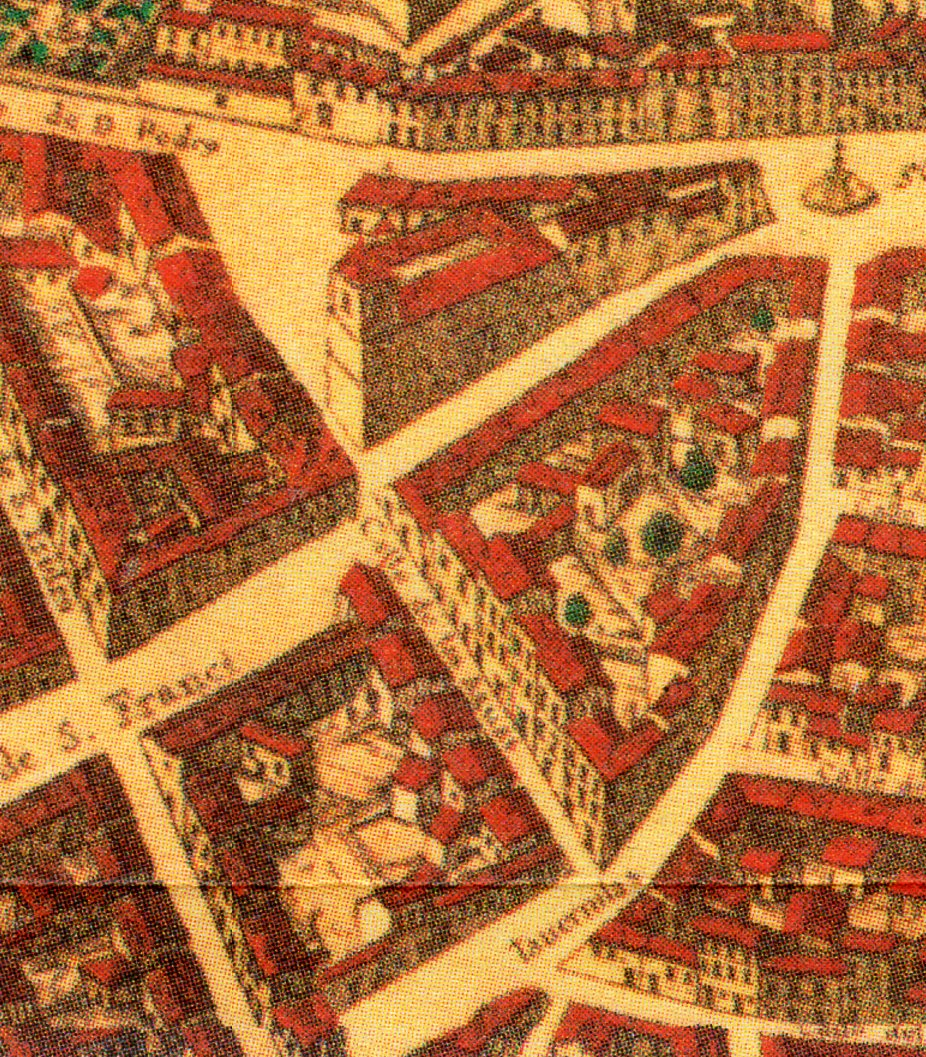 Topografía de la Villa de Madrid descrita por Don Pedro Texeira en 1656, en la cual se demuestran todas las calles al largo y ancho de cada una de ellas, las rinconadas y lo que tuercen las Plazas, fuentes, jardines y huertas con la disposición que tienen las parroquias, Monasterios y Hospitales están señalados sus nombres con letras y números que se hallaran en la tabla y los demás edificios, torres y delanteras de las casas de la parte que mira al Mediodía están sacadas al natural que se podrán tocar las puertas y ventanas de cada una de ellas.